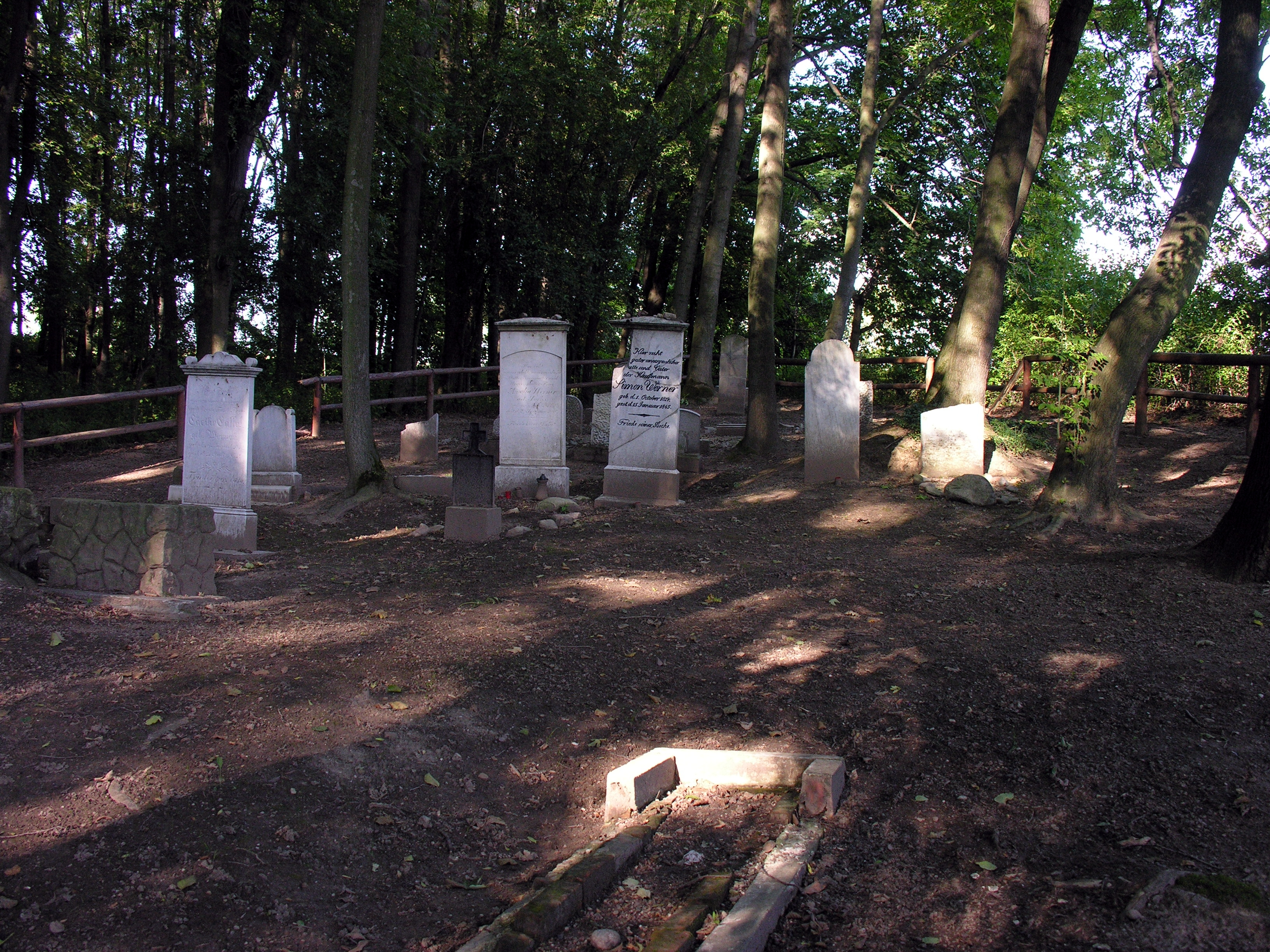 Cmentarz żydowski w Otmuchowie